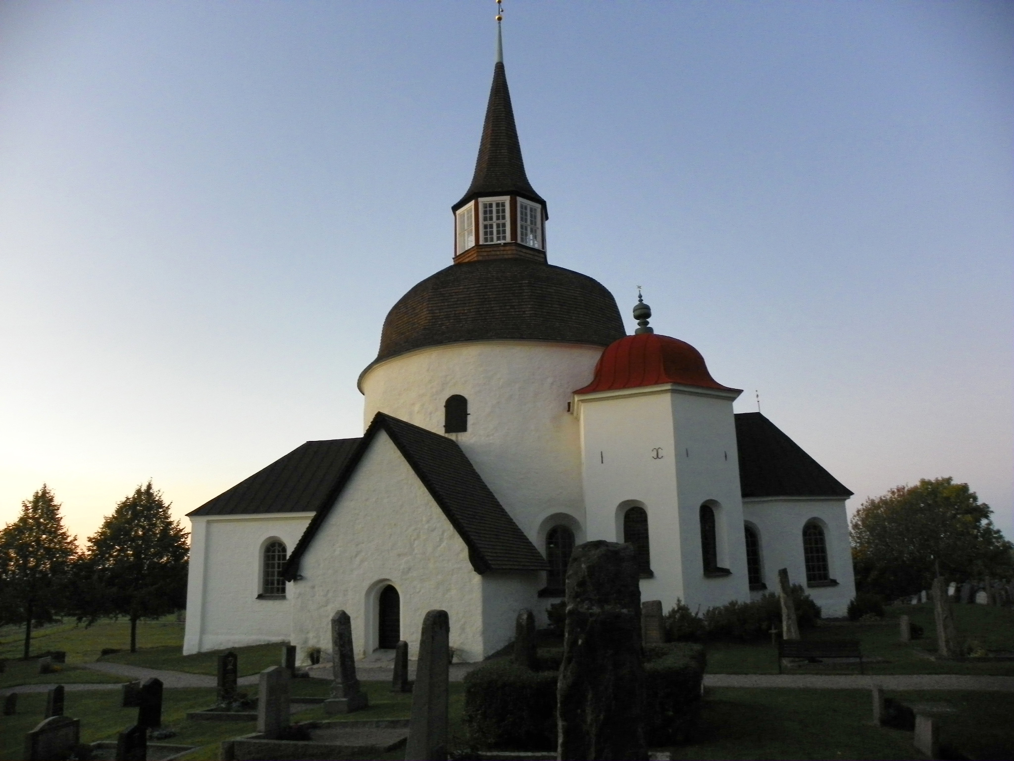 Järnåldern